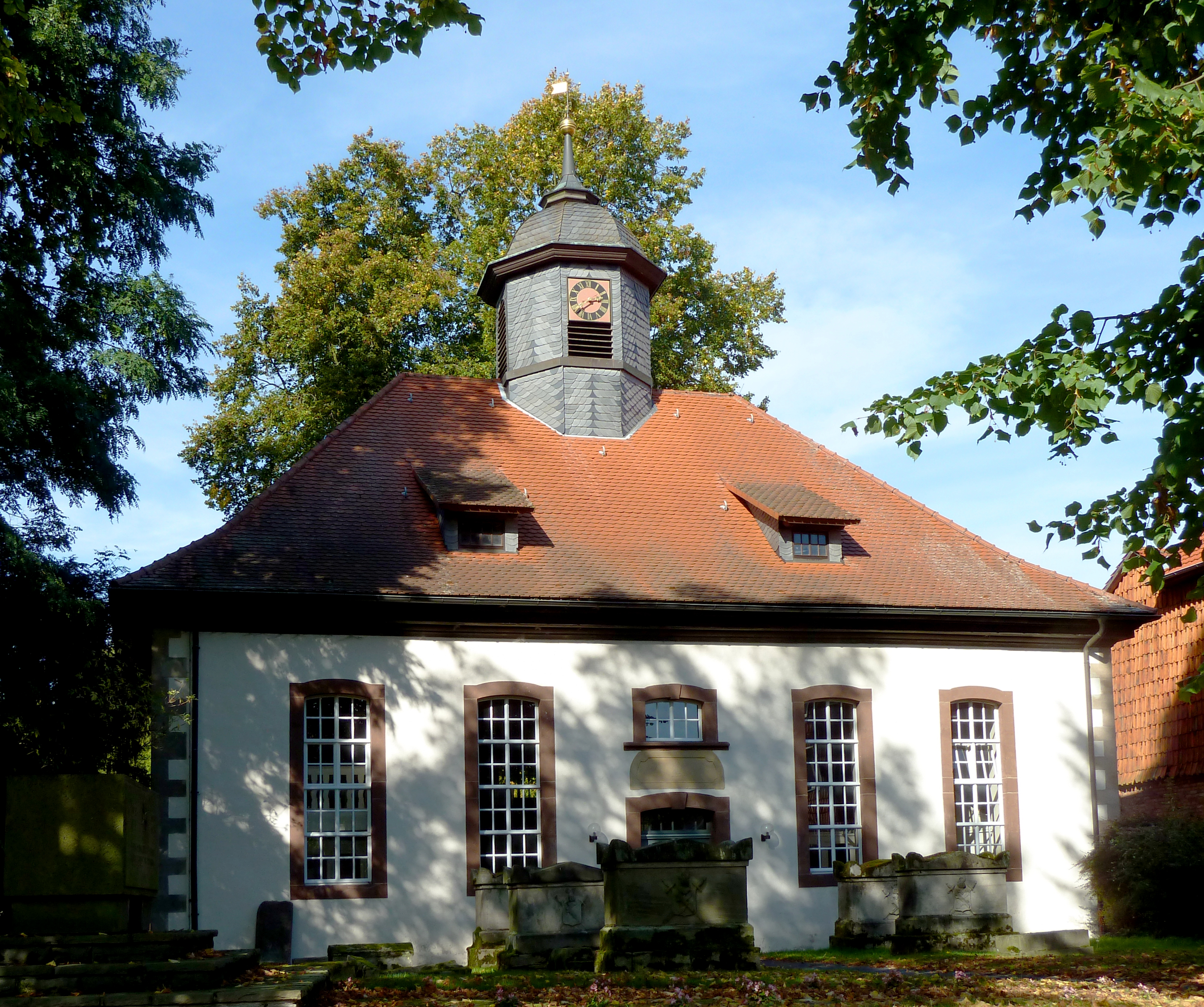 Ev.-luth. Kirche in Löwenhagen, Gemeinde Niemetal, Niedersachsen. Erbaut 1792 unter dem Patronat von Ernst Friedrich Christian Börries von Stockhausen. (Lt. Baudenkmale in Niedersachsen 5.2 Patrozinium St. Michael)